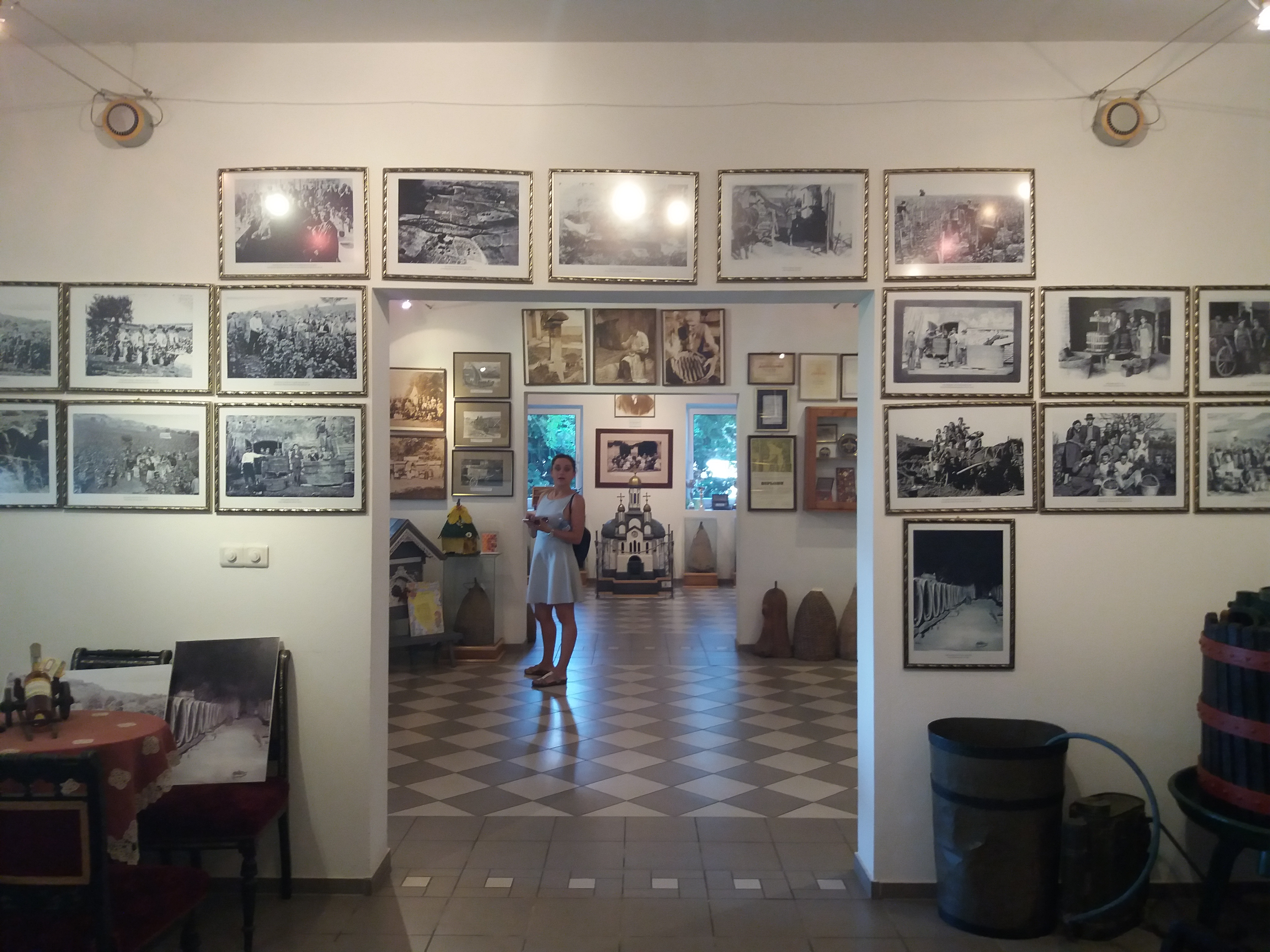 Srpski (latinica): Muzej pčelarstva, Sremski Karlovci